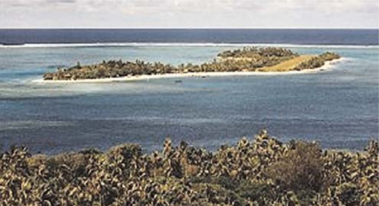 Inyeug Islet, nearshoe southwest of Aneityum Island, southern Vanuatu